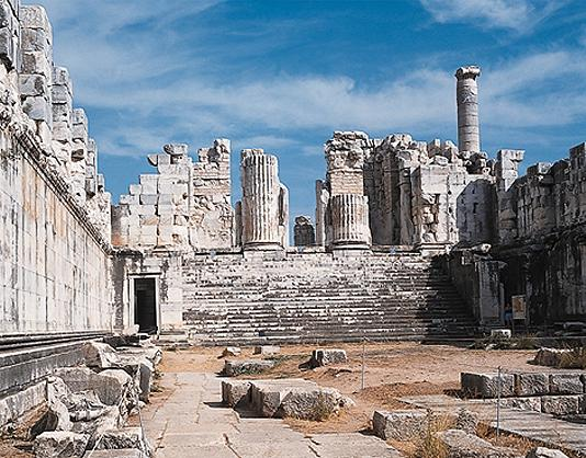 Didyma, ruiny miasta na wschodnim wybrzeżu morza egejskiego.